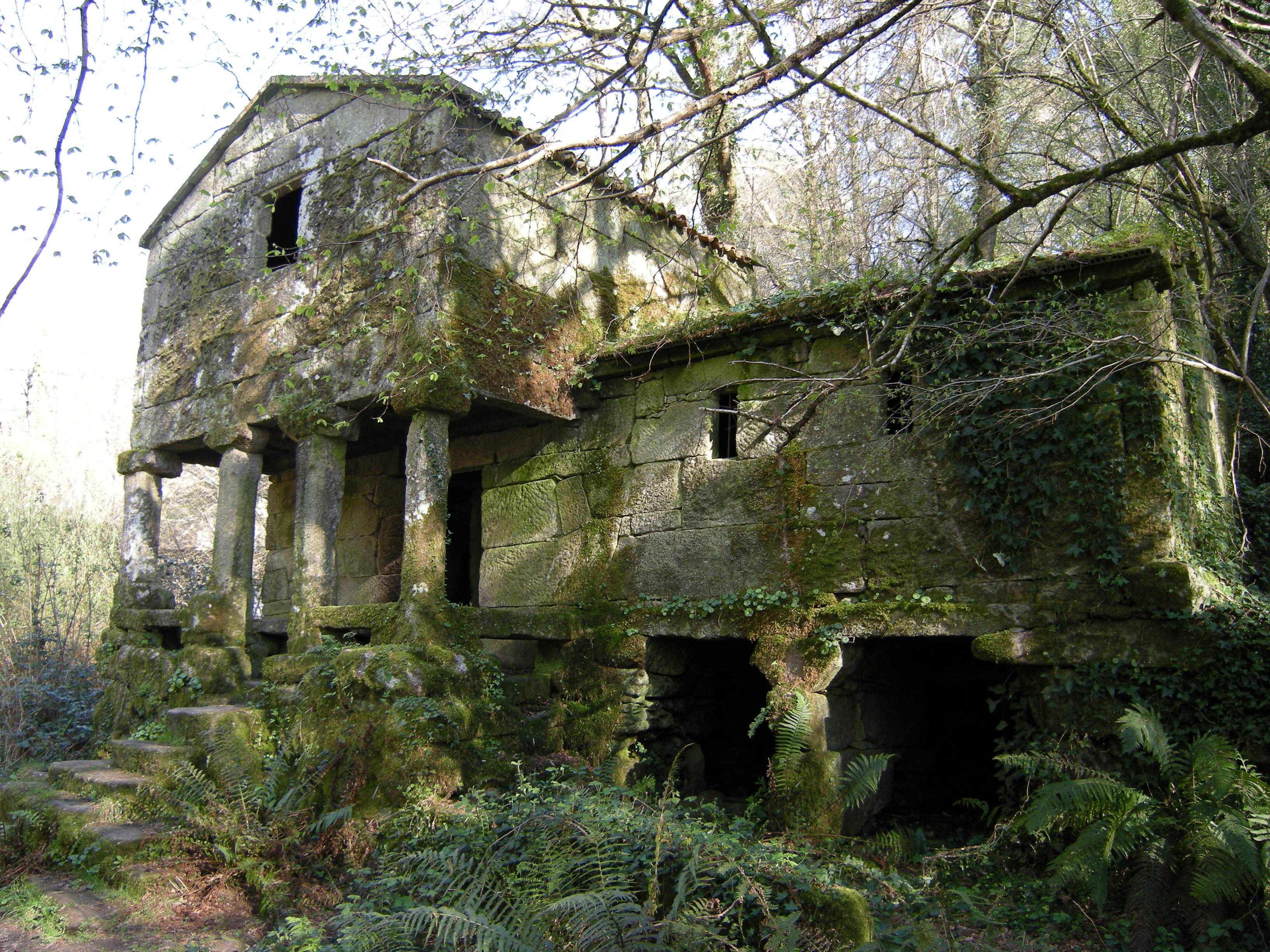 Casa Muiño das Maquías, Zamáns, Vigo